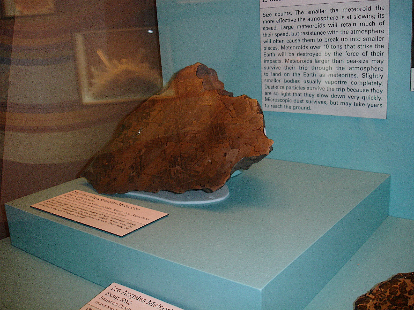 Laguna Manantiales meteorite